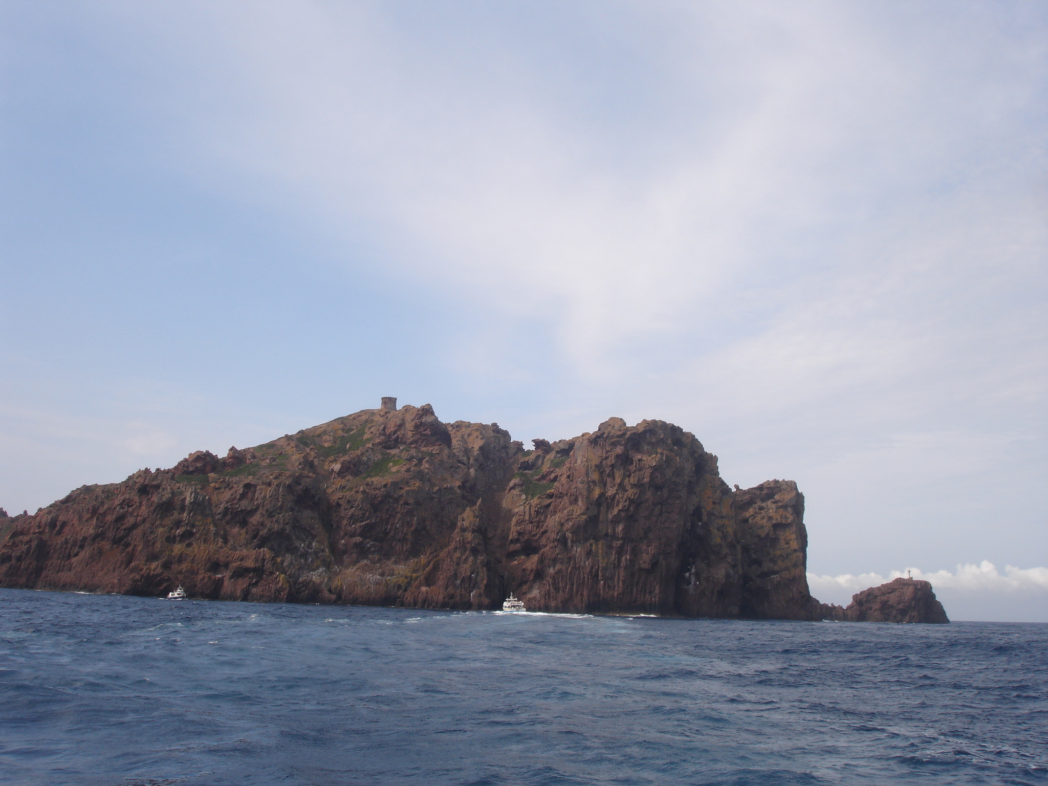 France, Corse-du-Sud (2A), Réserve de Scandola, Île de Gargalo